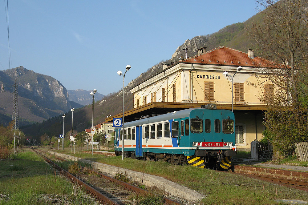 Stazione ferroviaria di Garessio. In sosta l'automotrice ALn 663.1198.